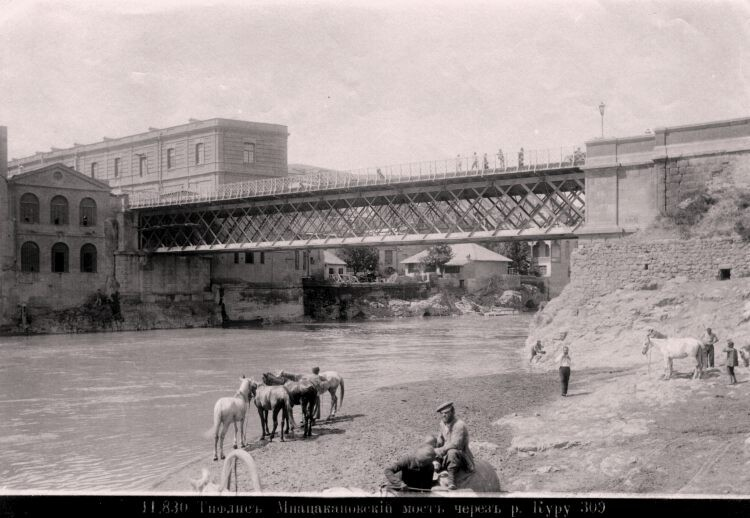 Мнацакановский мост через Куру в Тифлисе